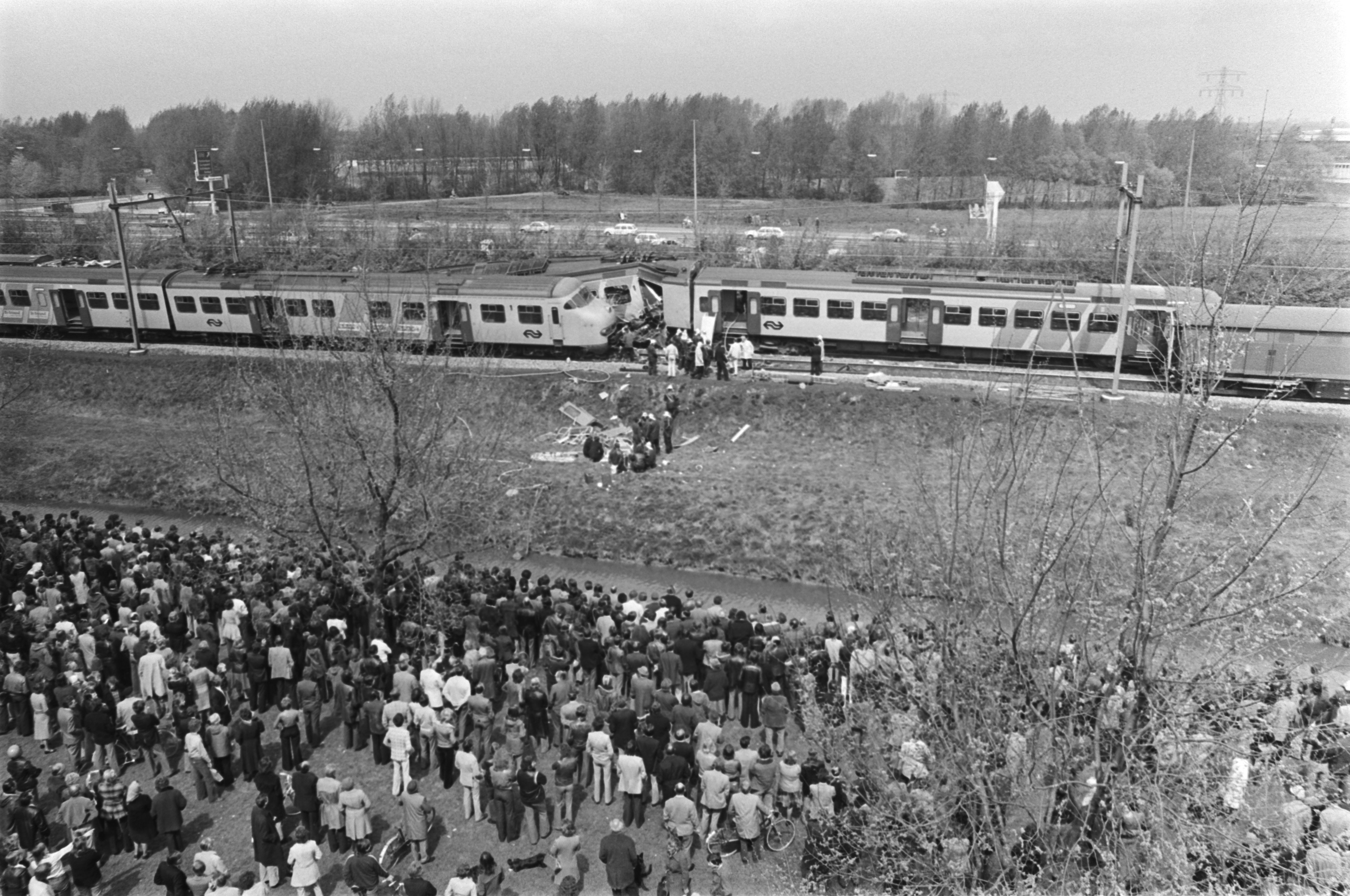 Collectie / Archief : Fotocollectie Anefo Reportage / Serie : [ onbekend ] Beschrijving : Treinramp bij Schiedam, 24 doden ; overzicht en publiek Datum : 4 mei 1976 Locatie : Schiedam, Zuid-Holland Trefwoorden : rampen, treinen Fotograaf : Verhoeff, Bert / Anefo Auteursrechthebbende : Nationaal Archief Materiaalsoort : Negatief (zwart/wit) Nummer archiefinventaris : bekijk toegang 2.24.01.05 Bestanddeelnummer : 928-5566